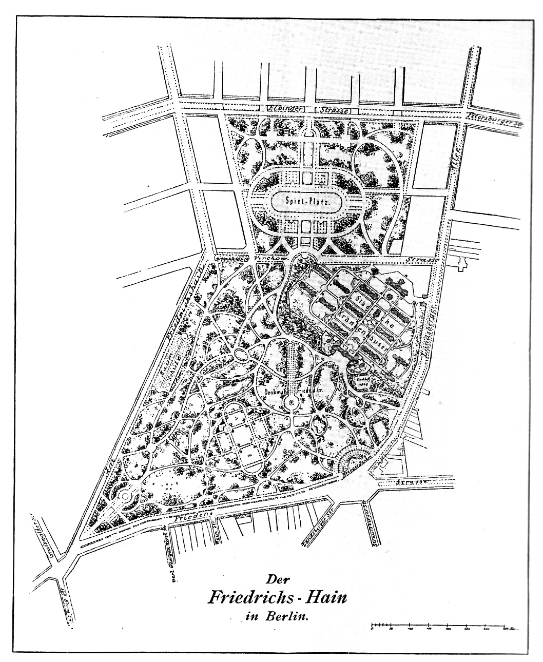 Plan des Volkspark Friedrichshain 1875, vermutlich von Gustav Meyer; gemeinfrei